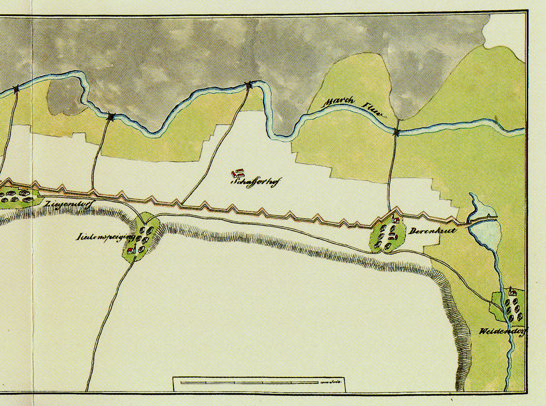 Verlauf des Kuruzzenwalls (Kuruzzenschanze) an der March zwischen Hagenau, Drösing, Jedenspeigen und Dürnkrut in Niederösterreich, um 1705